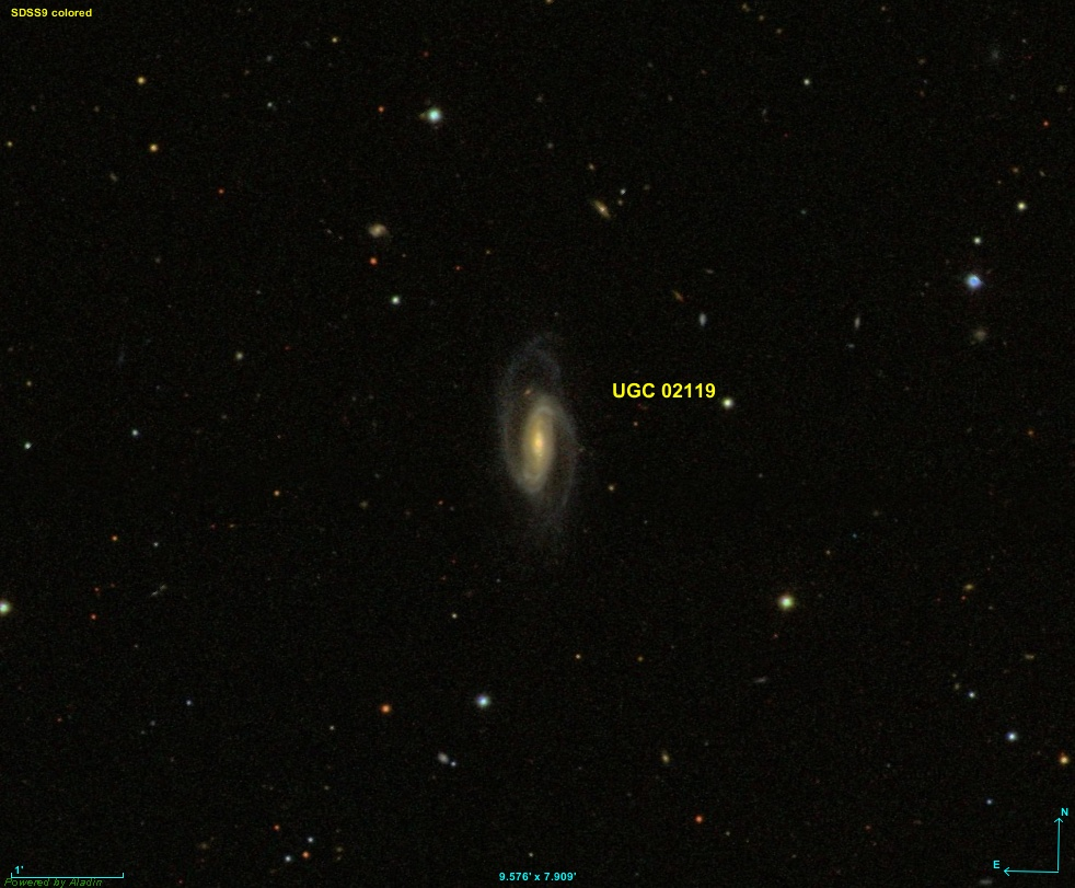 Image créée à l'aide du logiciel Aladin Sky Atlas du Centre de Données astronomiques de Strasbourg et des données de SDSS (Sloan Digital Sky Survey).